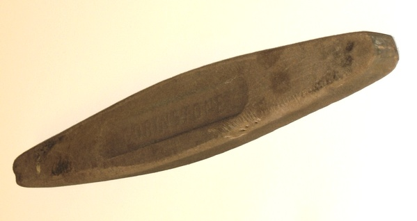 Summary Pierre à eau servant à aiguiser des outils de coupe. Objet personnel